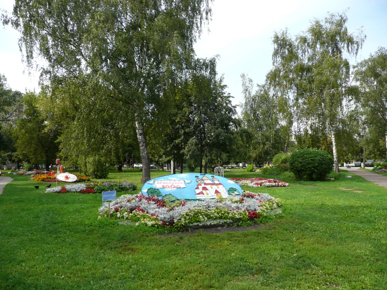 Сквер перед кинотеатром "Родина" в дни празднования 1000-летия Ярославля